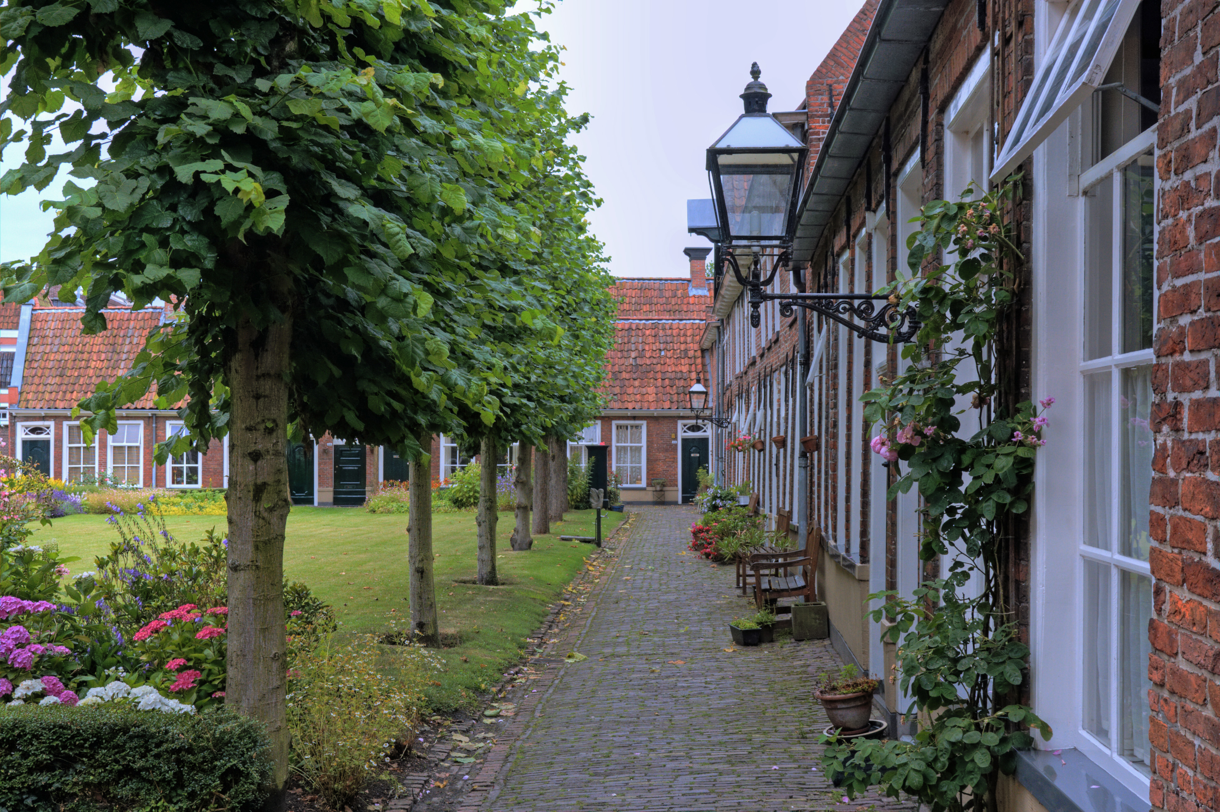 Binnenplaats Sint-Anthonygasthuis (stad Groningen, Nederland)